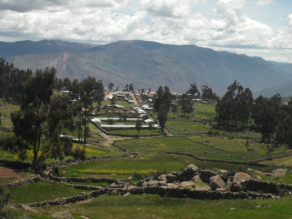 español